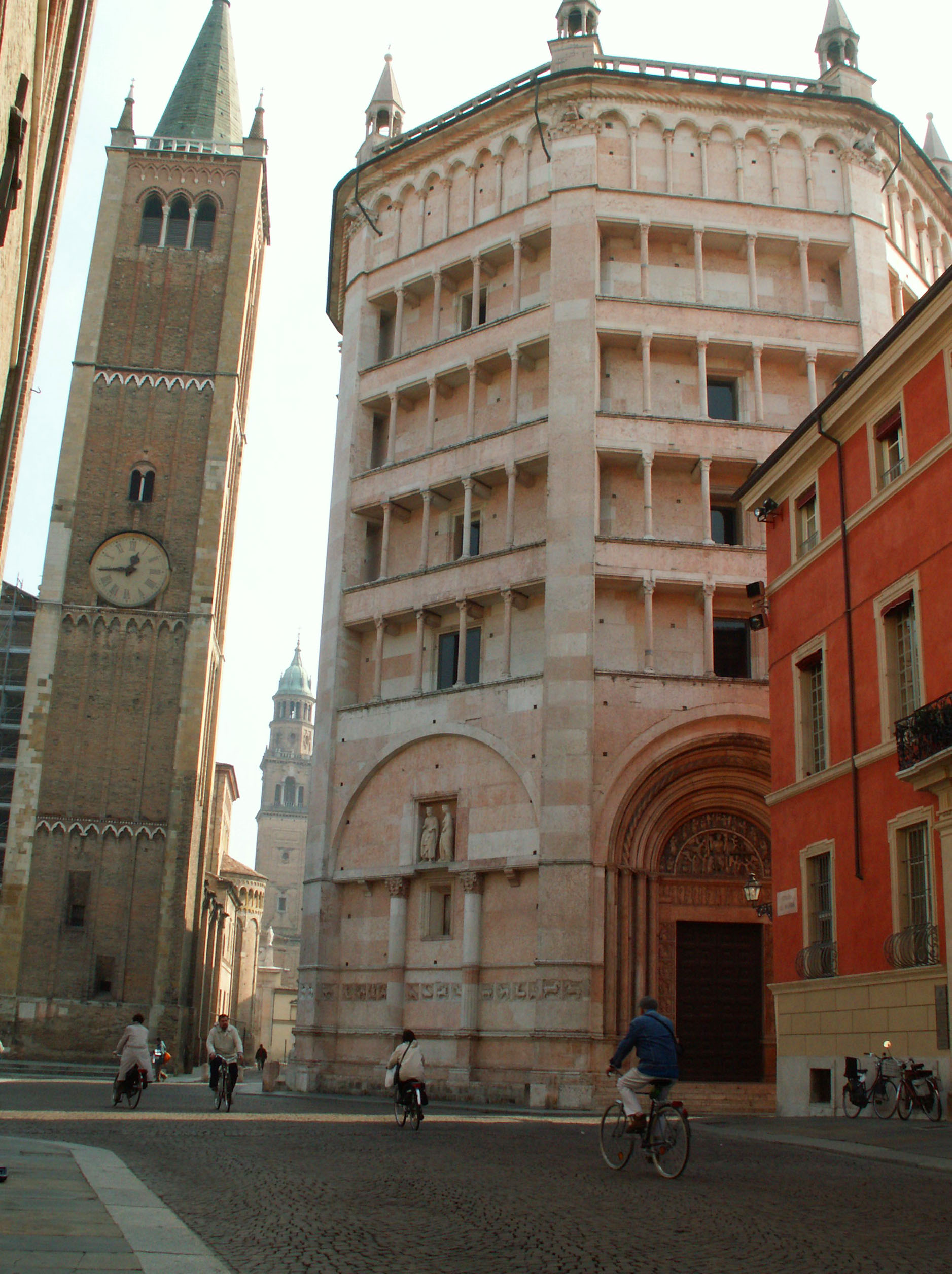 Battistero e Campanile, Parma, Italia